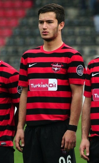 Oğulcan Çağlayan